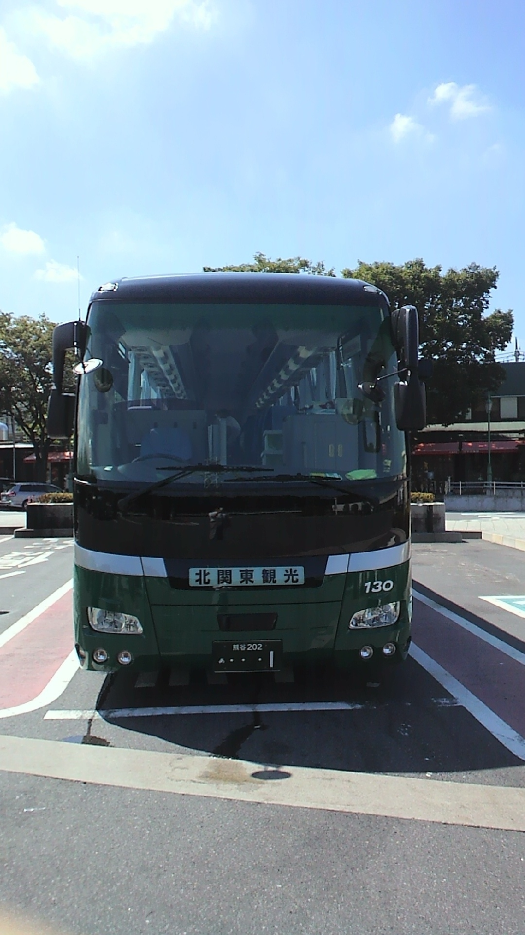 有限会社北関東観光の大型観光バス正席49名乗（2012.12川口PAにて）